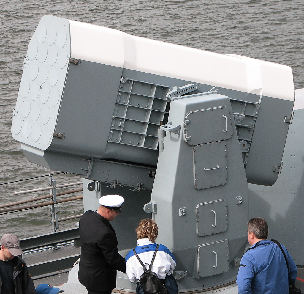 Beschreibung: RIM-116 Rolling Airframe Missile (RAM) Launcher auf dem Schnellboot Wiesel Fotograf: Darkone, 13. August 2005